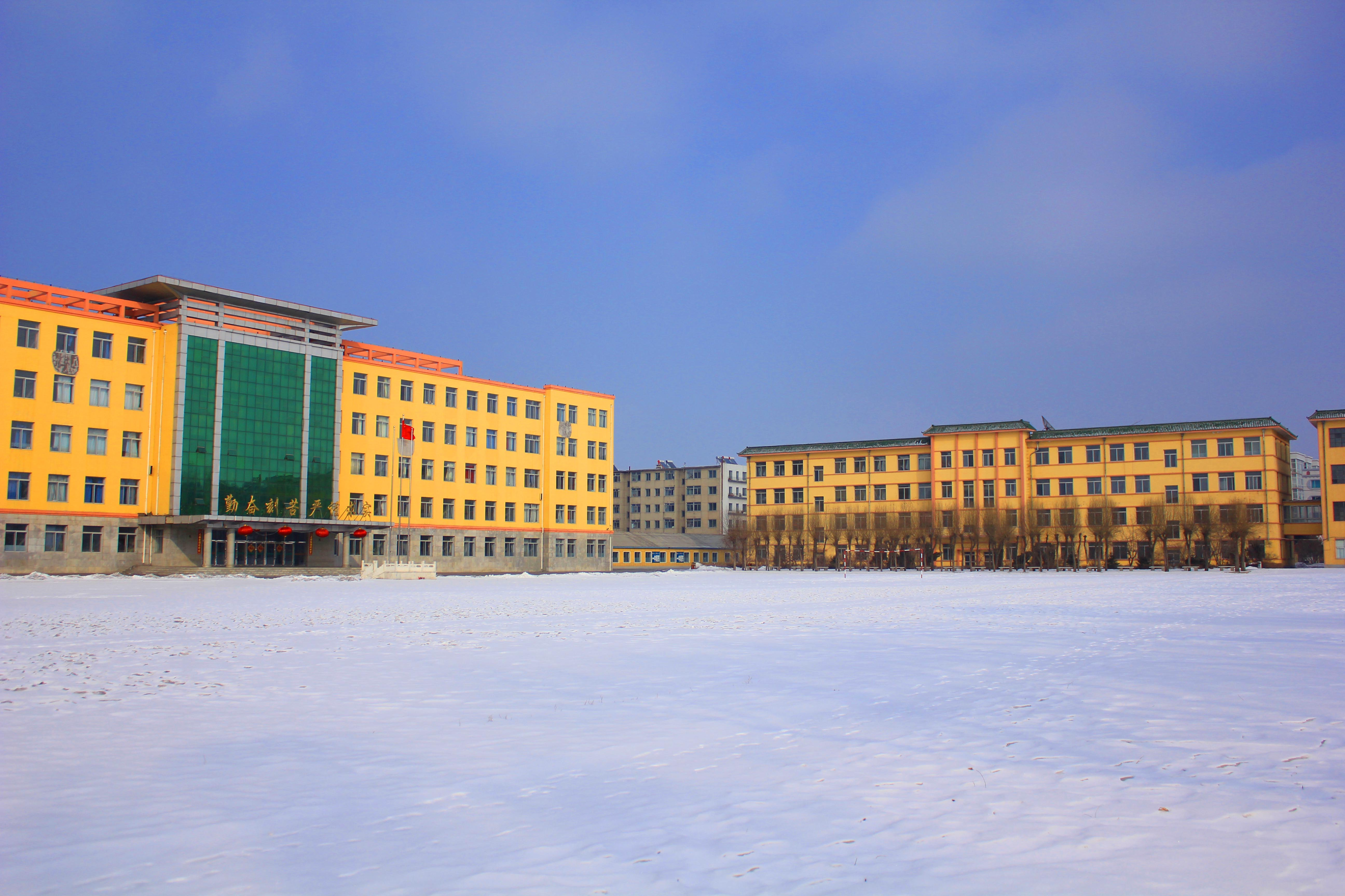 伊通满族自治县第一中学校